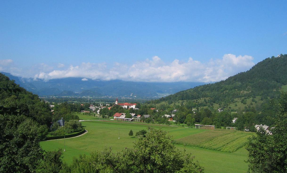 Begunje, village in Gorenjska region, Slovenia. photo:Ziga 19:34, 16 August 2006 (UTC)